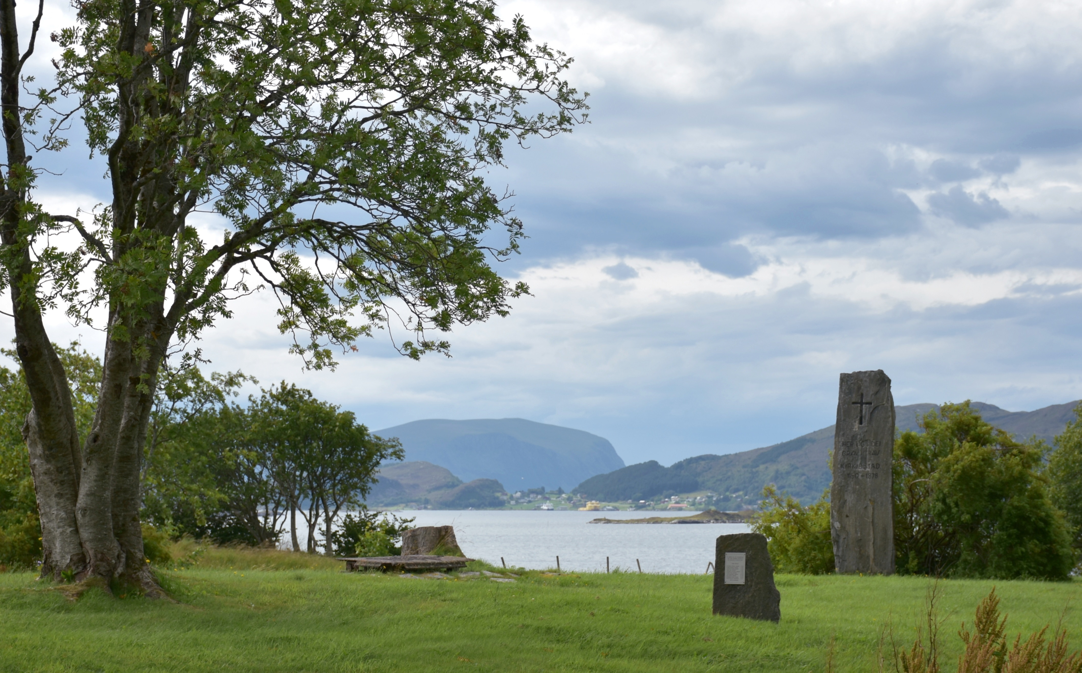 Ulstein gamle kirkested